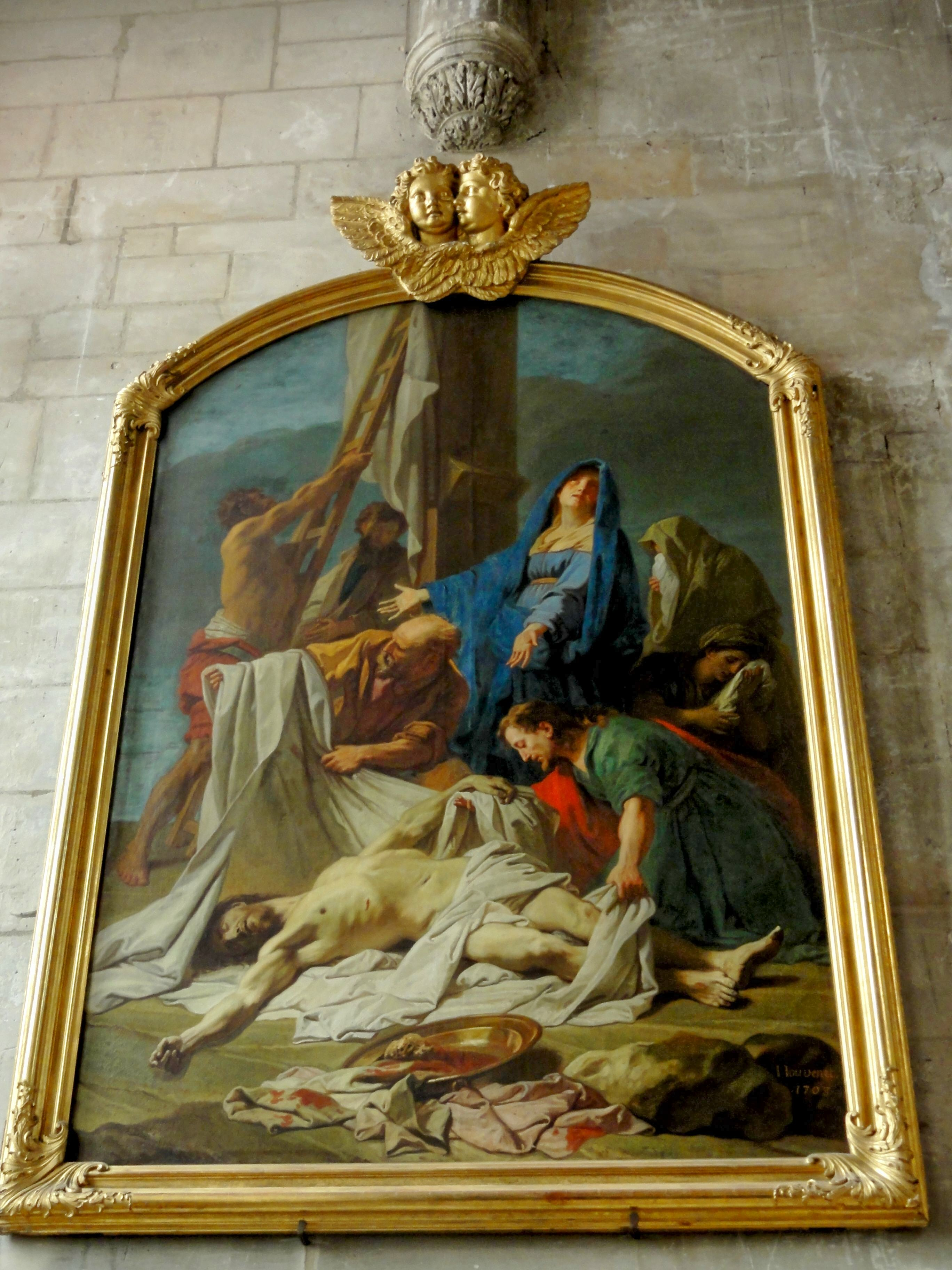 Jean Jouvenet, Déposition de la Croix, 1708, Pontoise, Cathédrale Saint-Maclou.